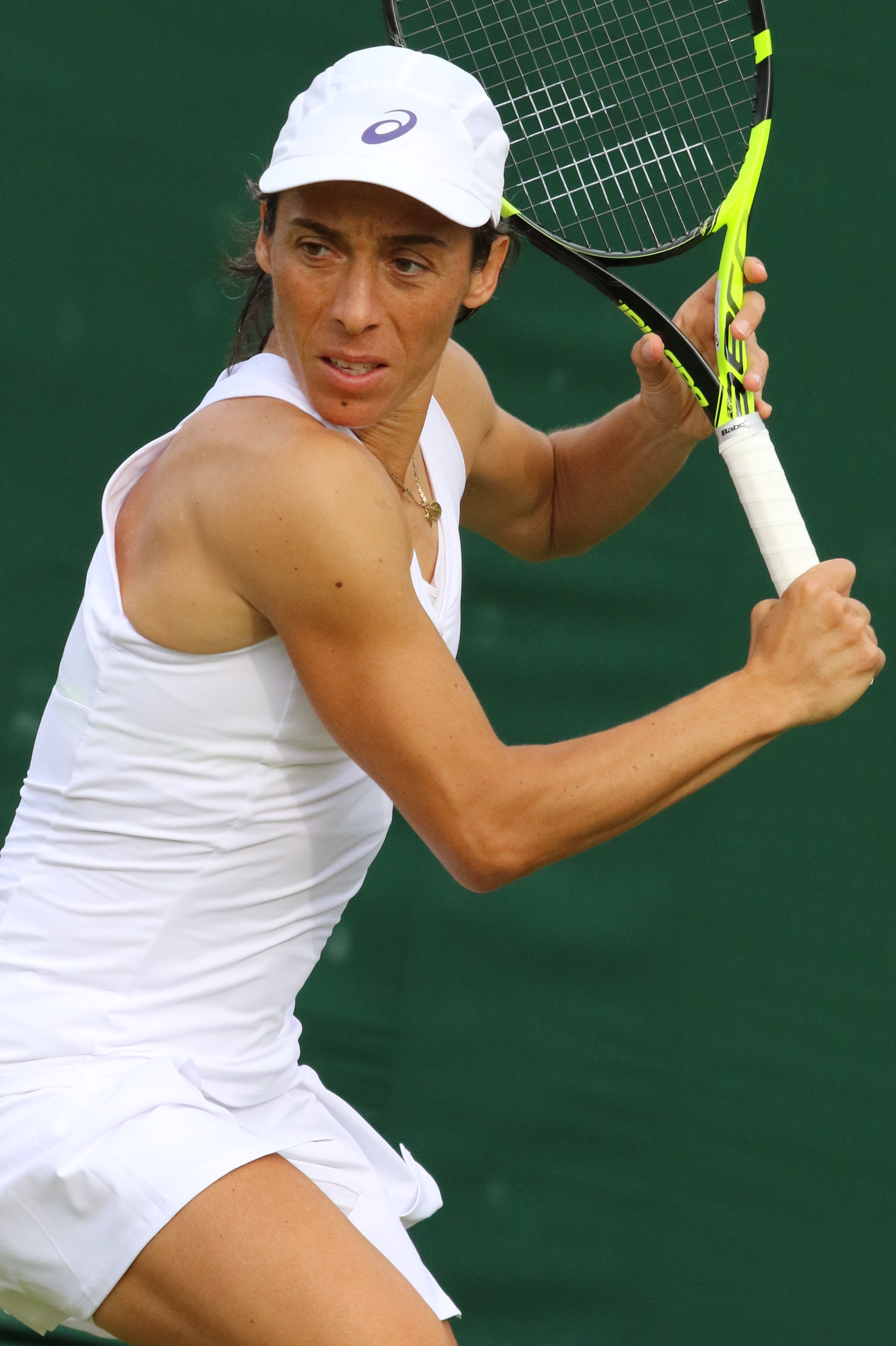 Schiavone WM16 (14)